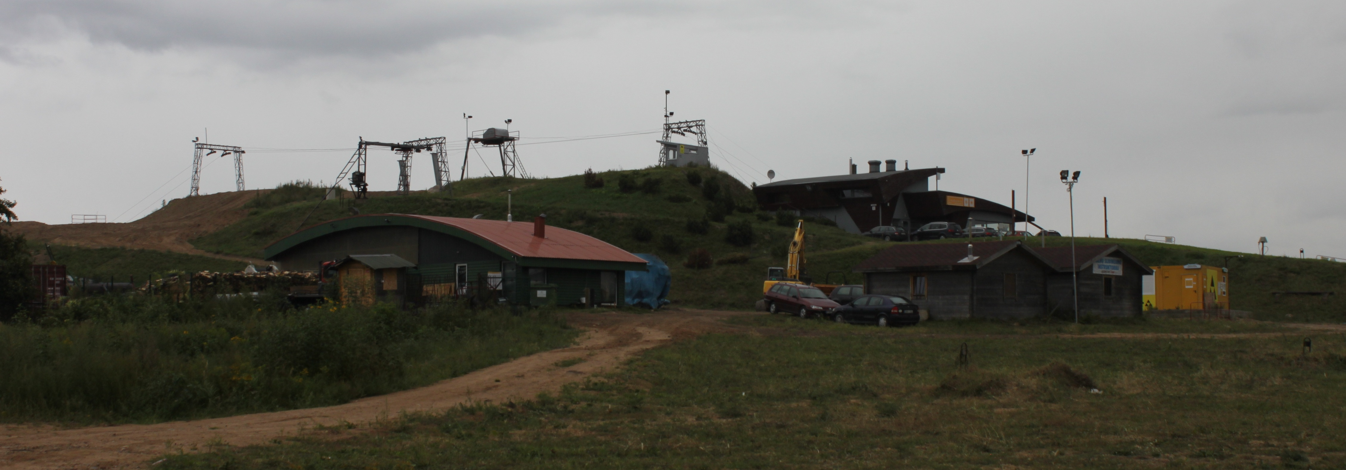 Liepkalnio slidinėjimo trasa, Vilnius